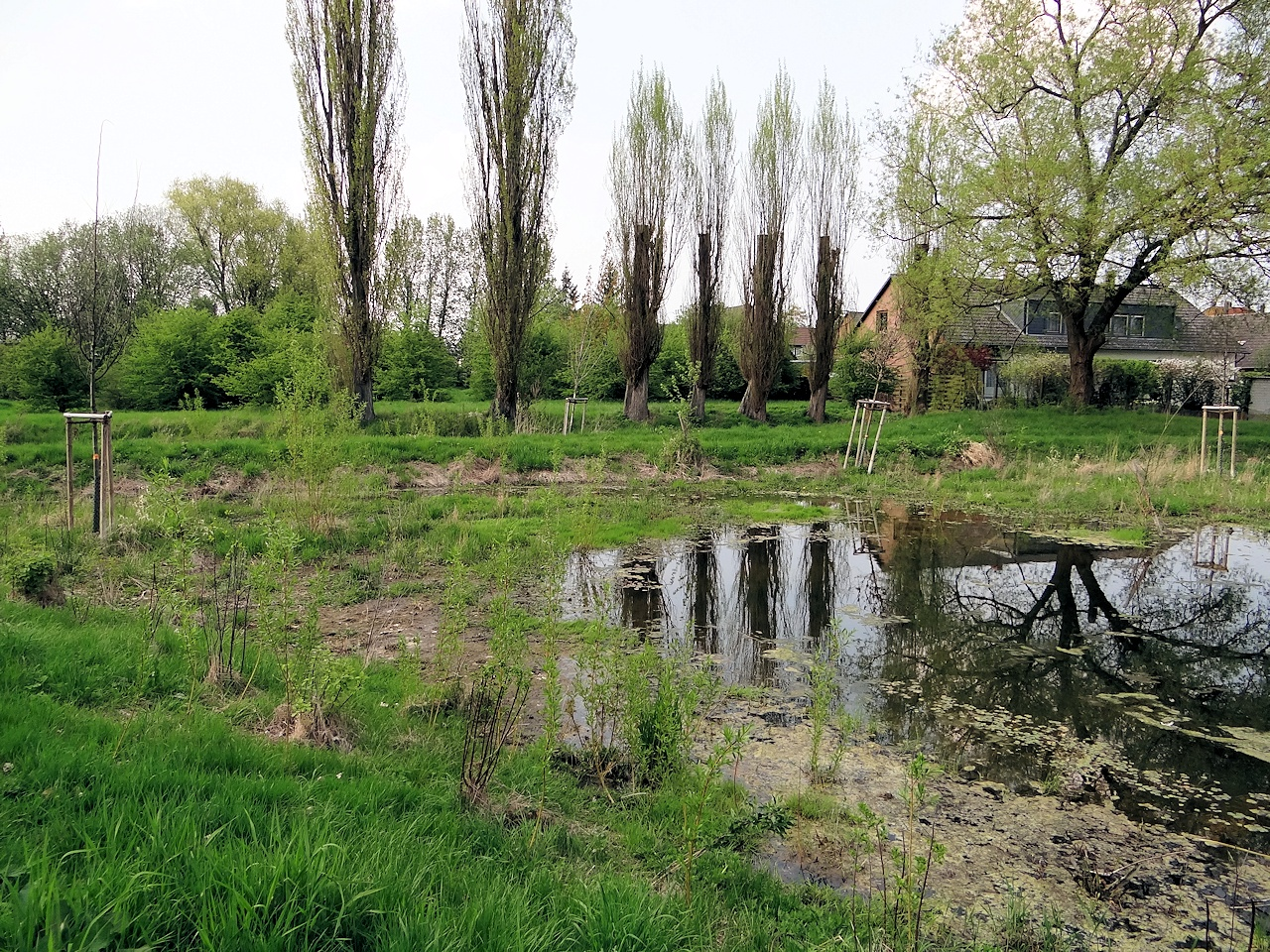 Hochwasserrückhaltebecken für die Kleine Mittelriede nahe der Kälberwiese, Blickrichtung Norden, der Bach fließt bei den Pappeln nach rechts.